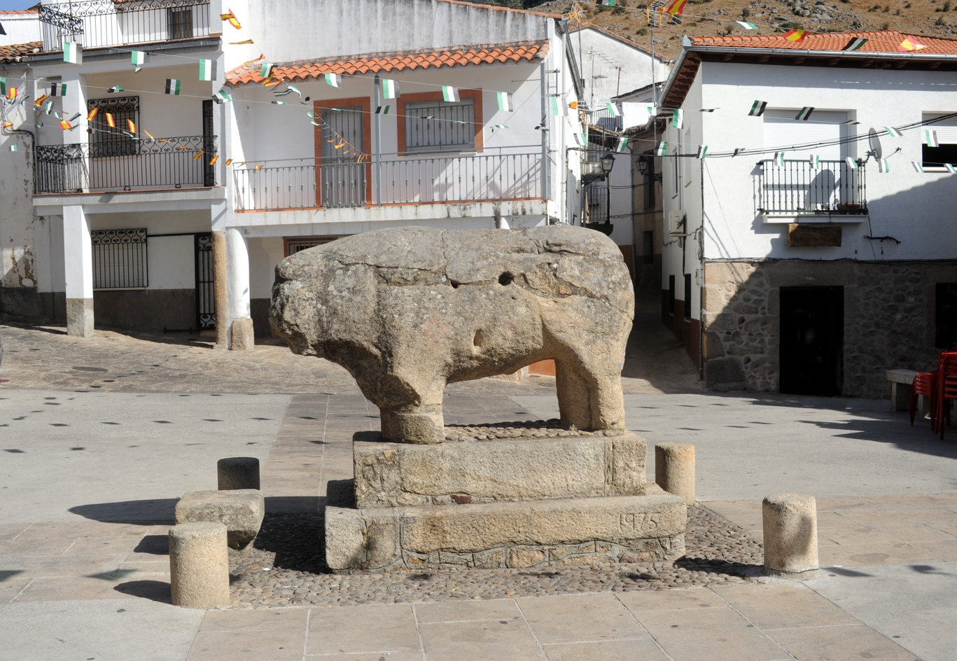 Toro de Segura de Toro. Escultura vetona del siglo VI a. C. Plaza Mayor de Segura de Toro (Cáceres)